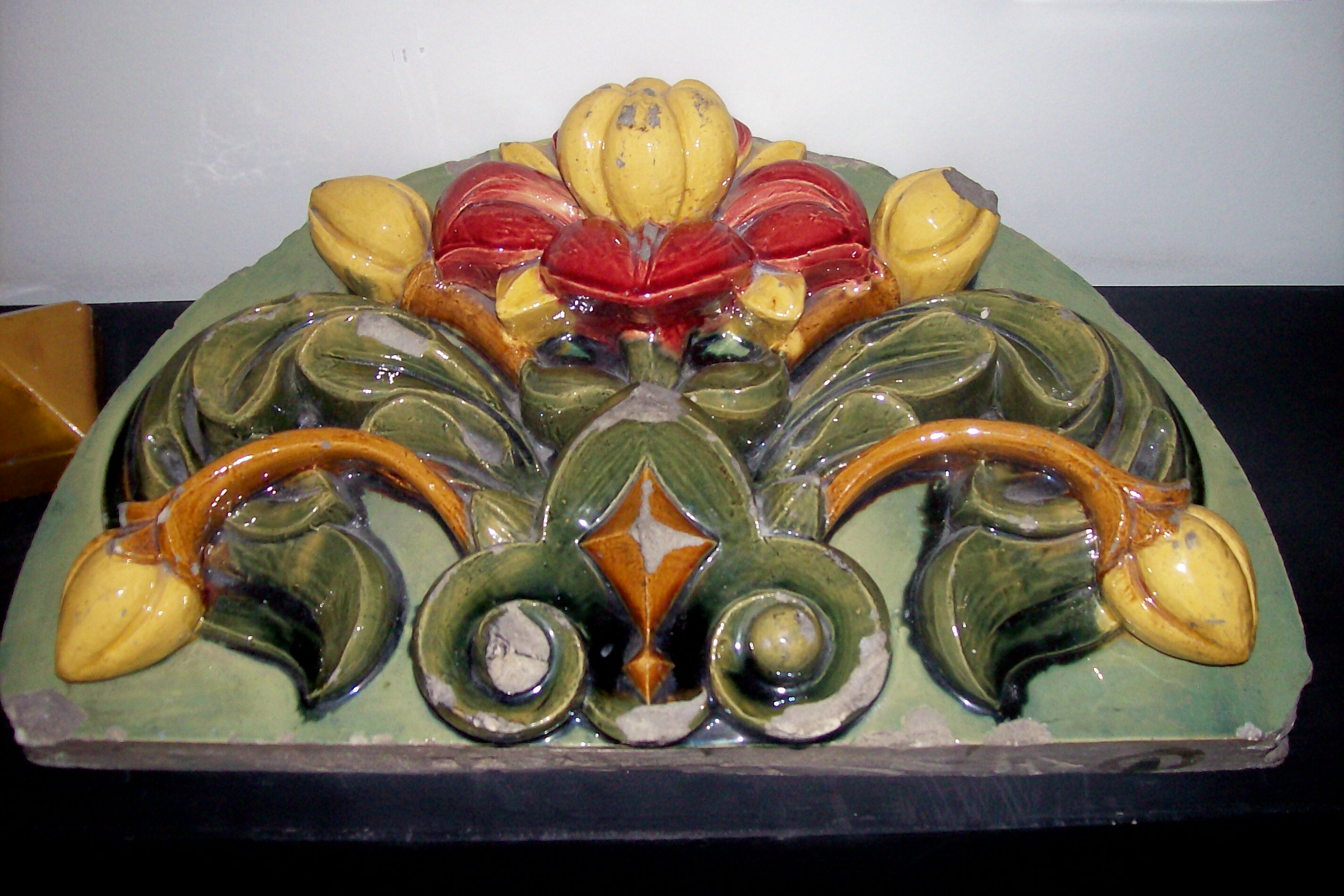 Cerámicas en el museo "Del Agua y de la Historia Sanitaria", en el edificio del Palacio de Aguas Corrientes, que son similares a las que se encuentran en su fachada exterior .Buenos Aires, Argentina.